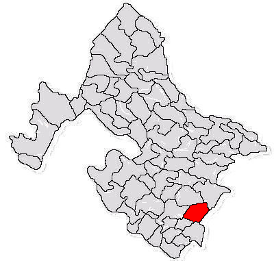 Categorie:Hărţi ale judeţului Mehedinţi